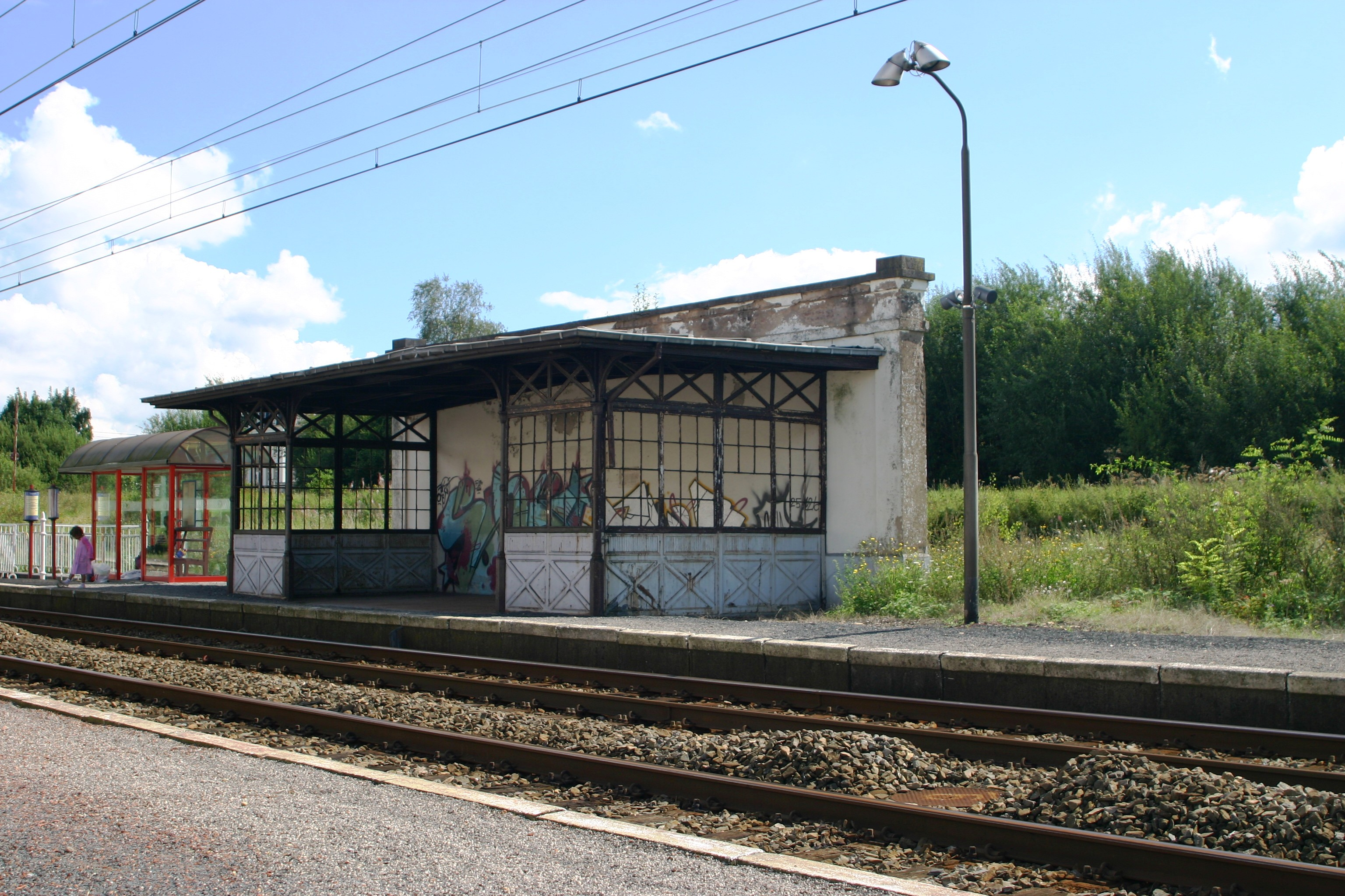 Pavillon dans la gare de Habay en 2008